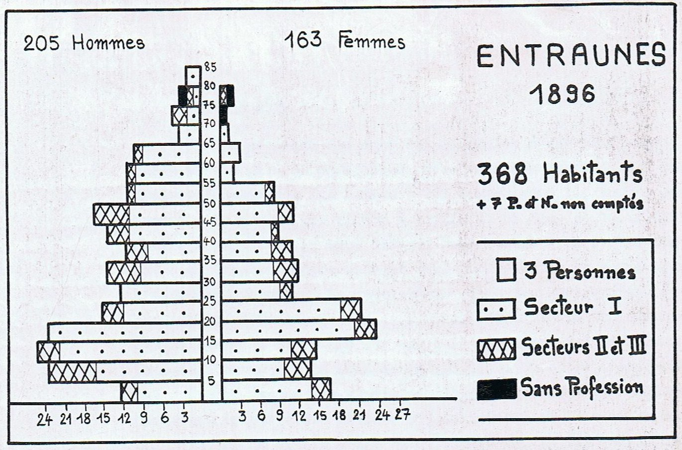 Entraunes : en 1896, pyramide des âges d'une communauté vieillissante rognée par l'exode rural